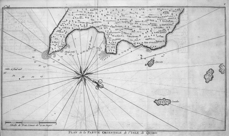 [Illustrations de Voyage autour du monde] Auteur : George Anson Éditeur : Henri-Albert Gosse et Compagnie (Genève) 1750